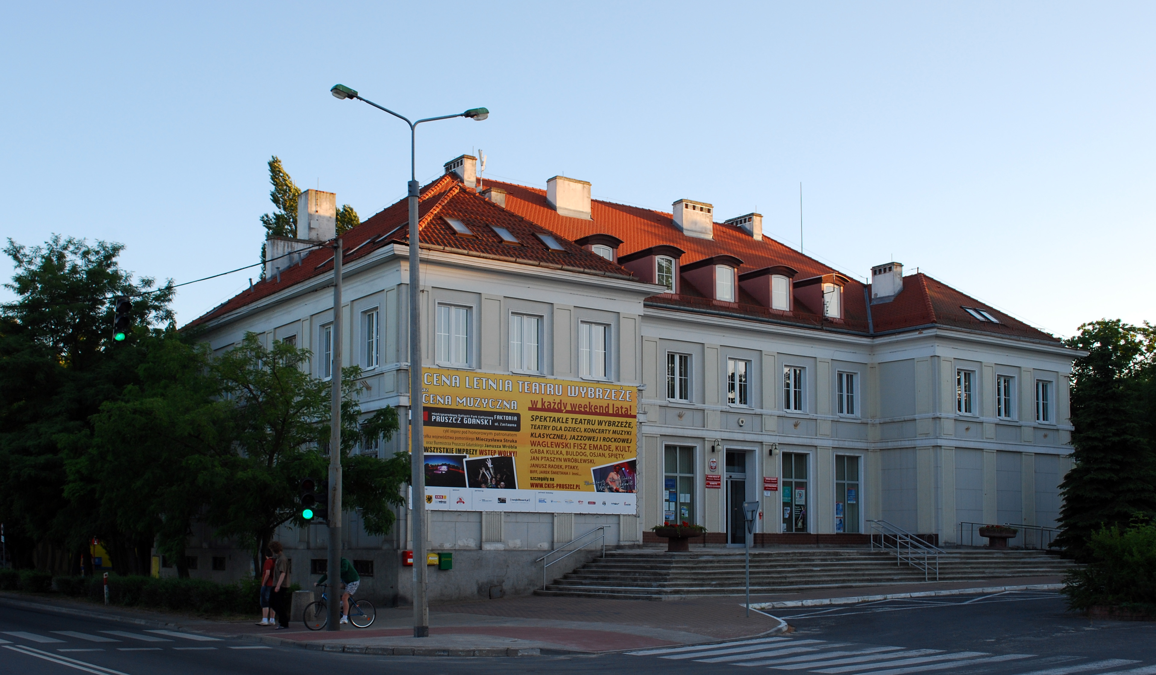 Urząd Miasta w Pruszczu Gdańskim